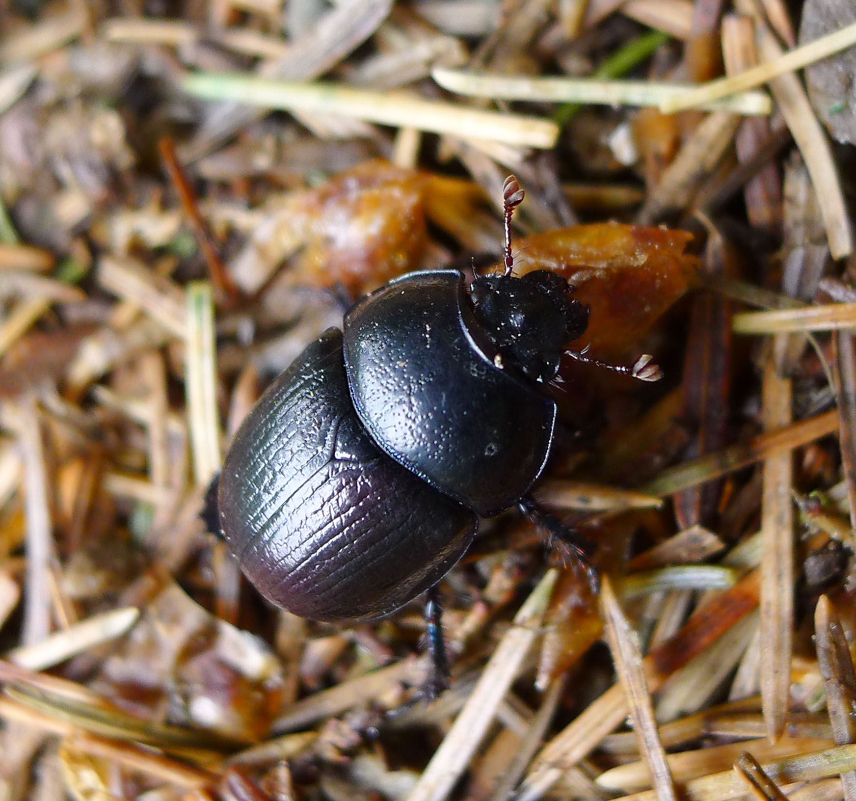 Dor Beetle. Geotrupes stercorarius? . Scarabidae